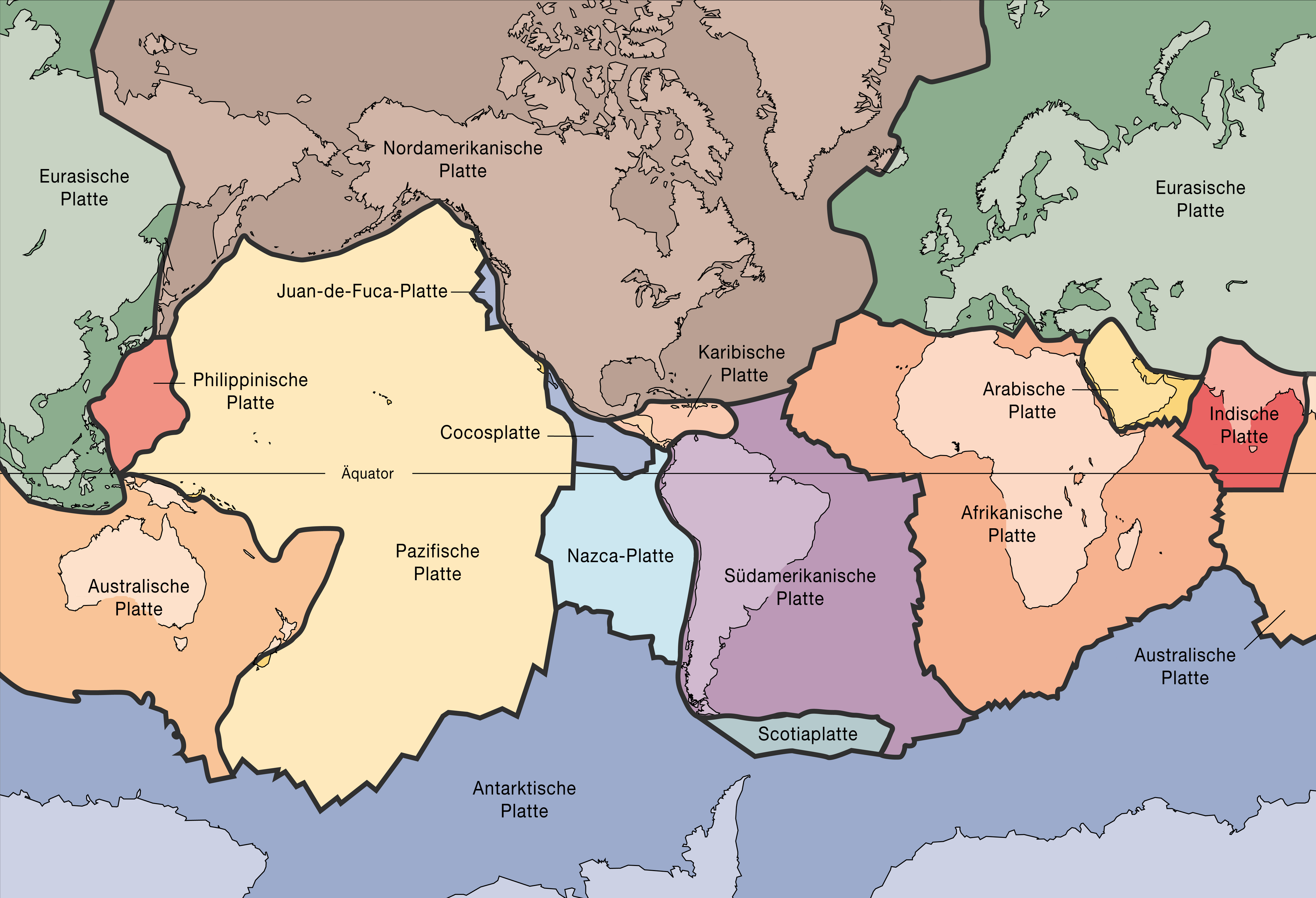 Tektonische Platten der Erde. Mit deutscher Beschriftung versehene Vorlage von Wikimedia Commons